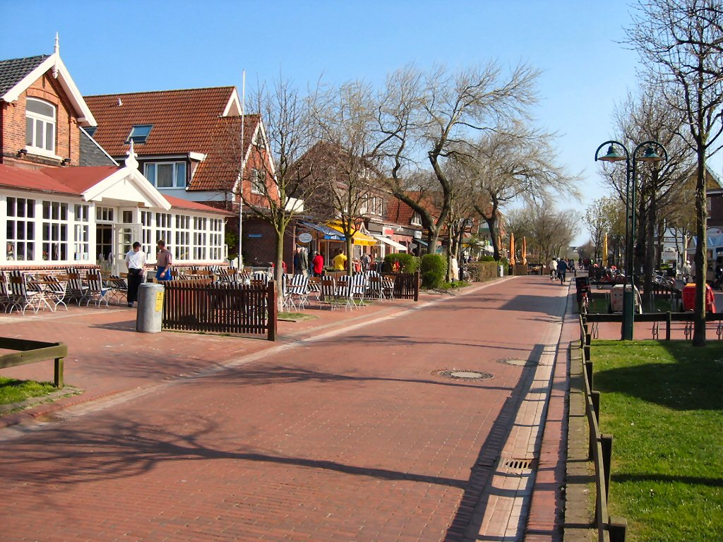 Langeoog: Die Barkhausenstraße ist die Hauptgeschäftsstraße der Insel Langeoog